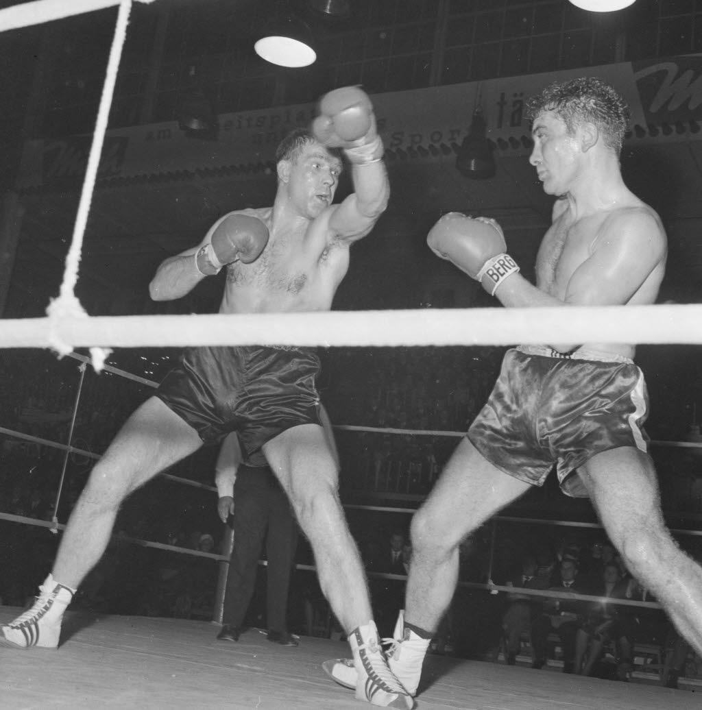 in der Ostseehalle. Im Bild Boxer Heini Meinhardt (links) und Boxer Klaus Stockmann (rechts).